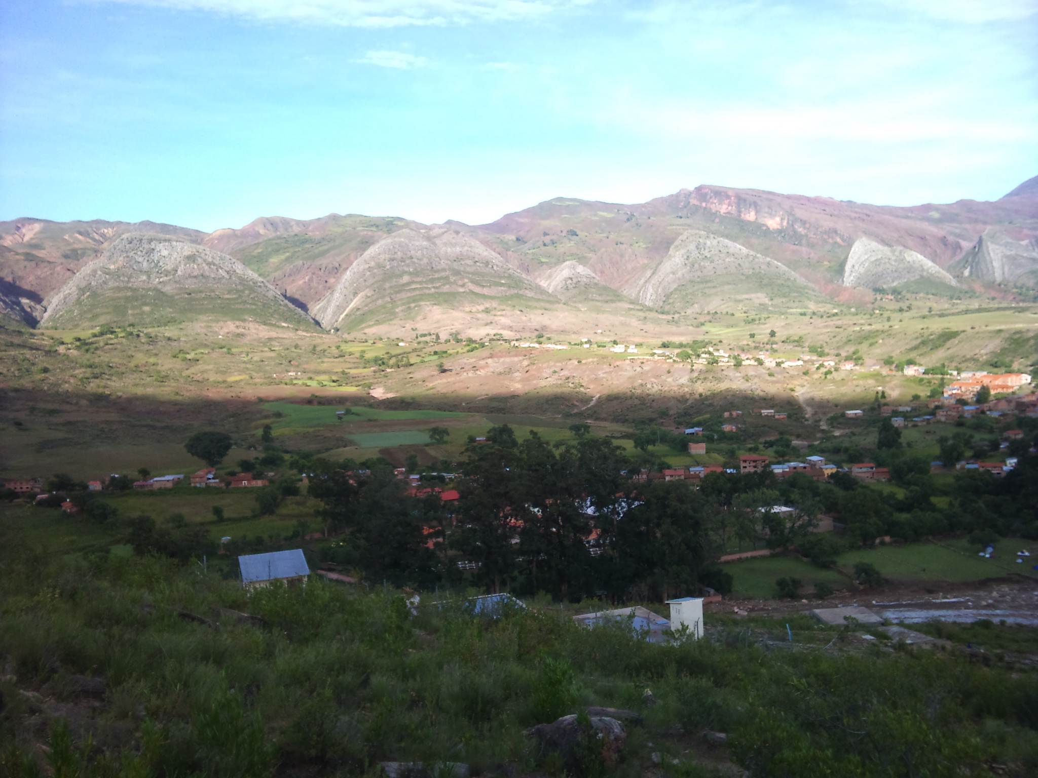 fotos de Bolivia